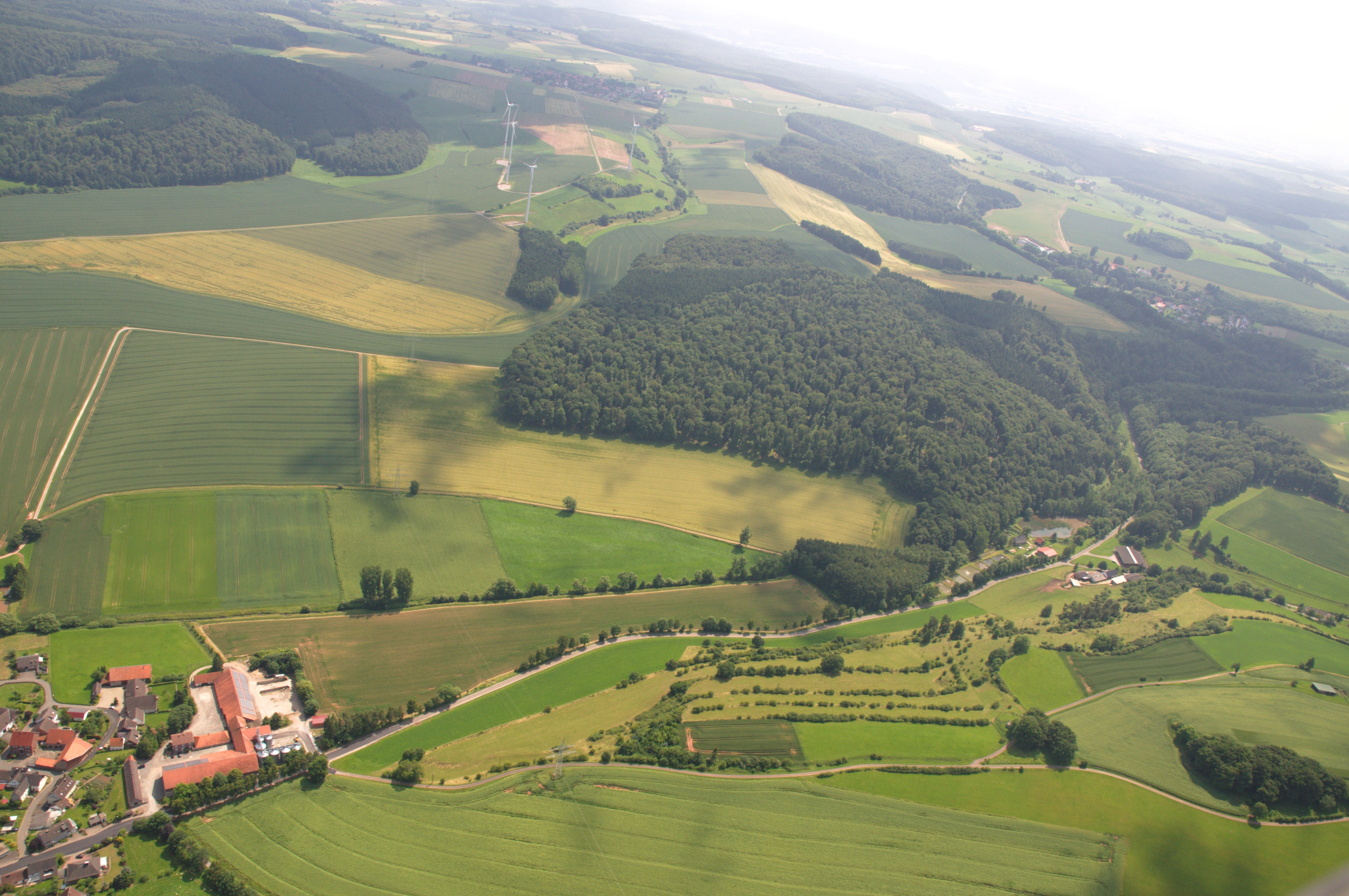 Fotofug Sauerland-Ost: Udorf, Udorfer Mühle, Naturschutzgebiet Schuberstein (HSK-378), Naturschutzgebiet Kittenberg (HSK-029), Glockenrücken südwestlich von Udorf, Naturschutzgebiet Udorfer Mühle (HSK-390), Blickrichtung Südosten. The making of this document was supported by the Community-Budget of Wikimedia Germany.